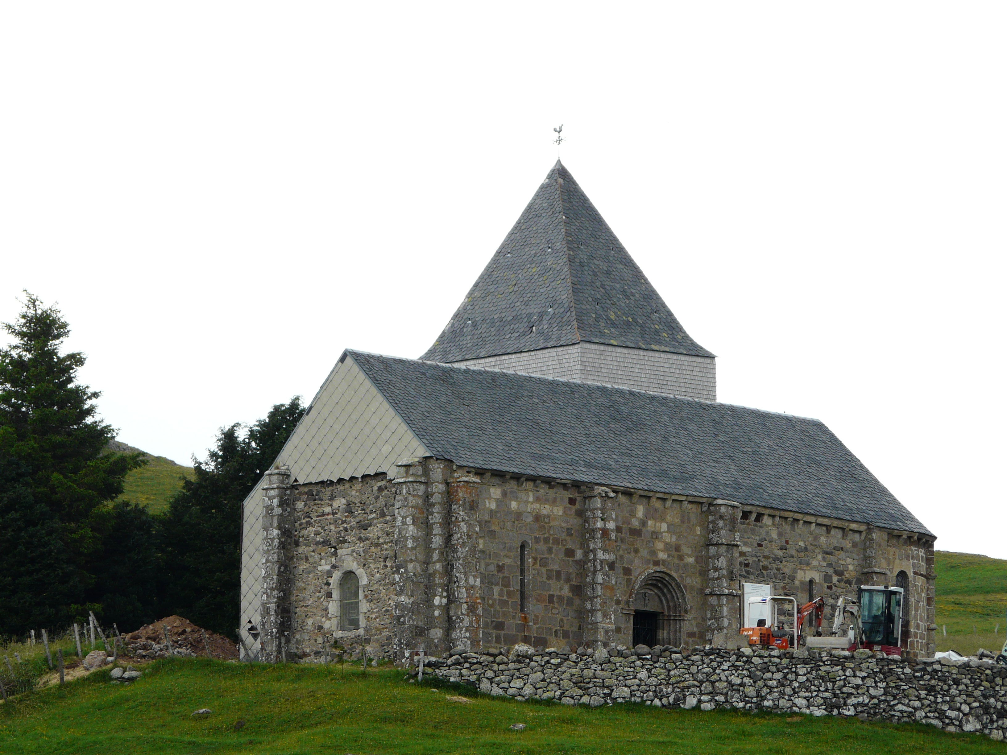 L'église Saint-Alyre, Saint-Alyre-ès-Montagne, Puy-de-Dôme, France.